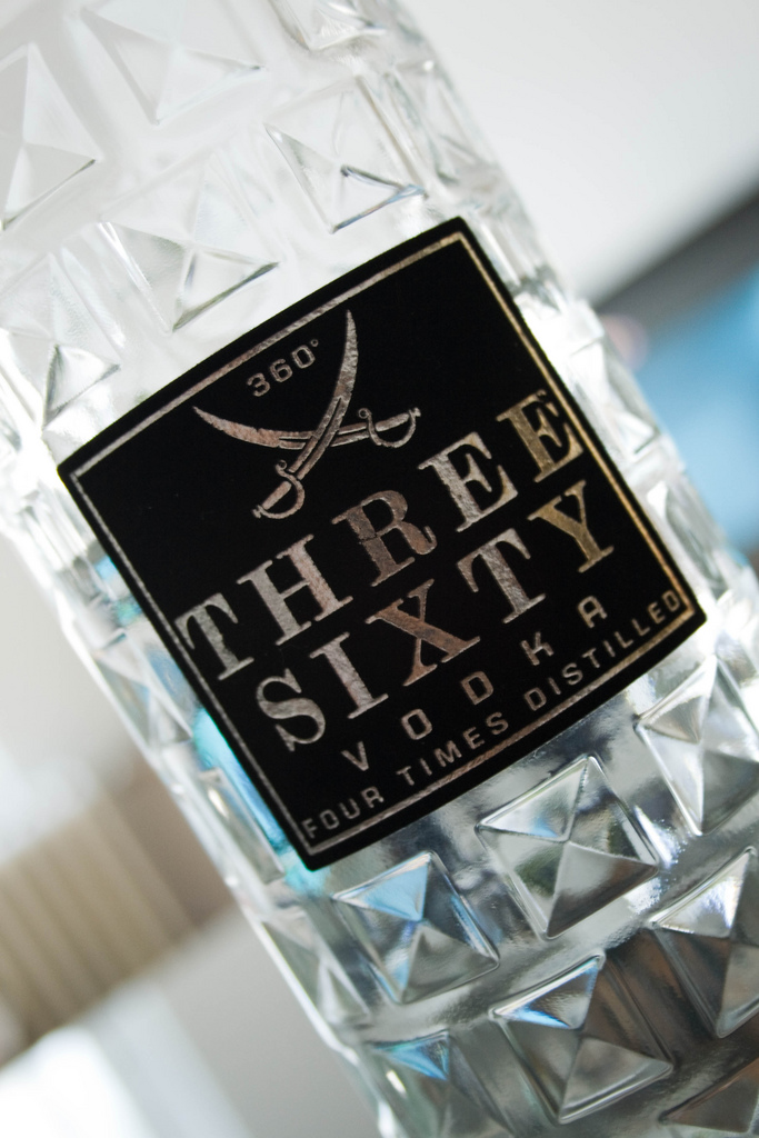 Samtlabel Three Sixty Vodka Flasche